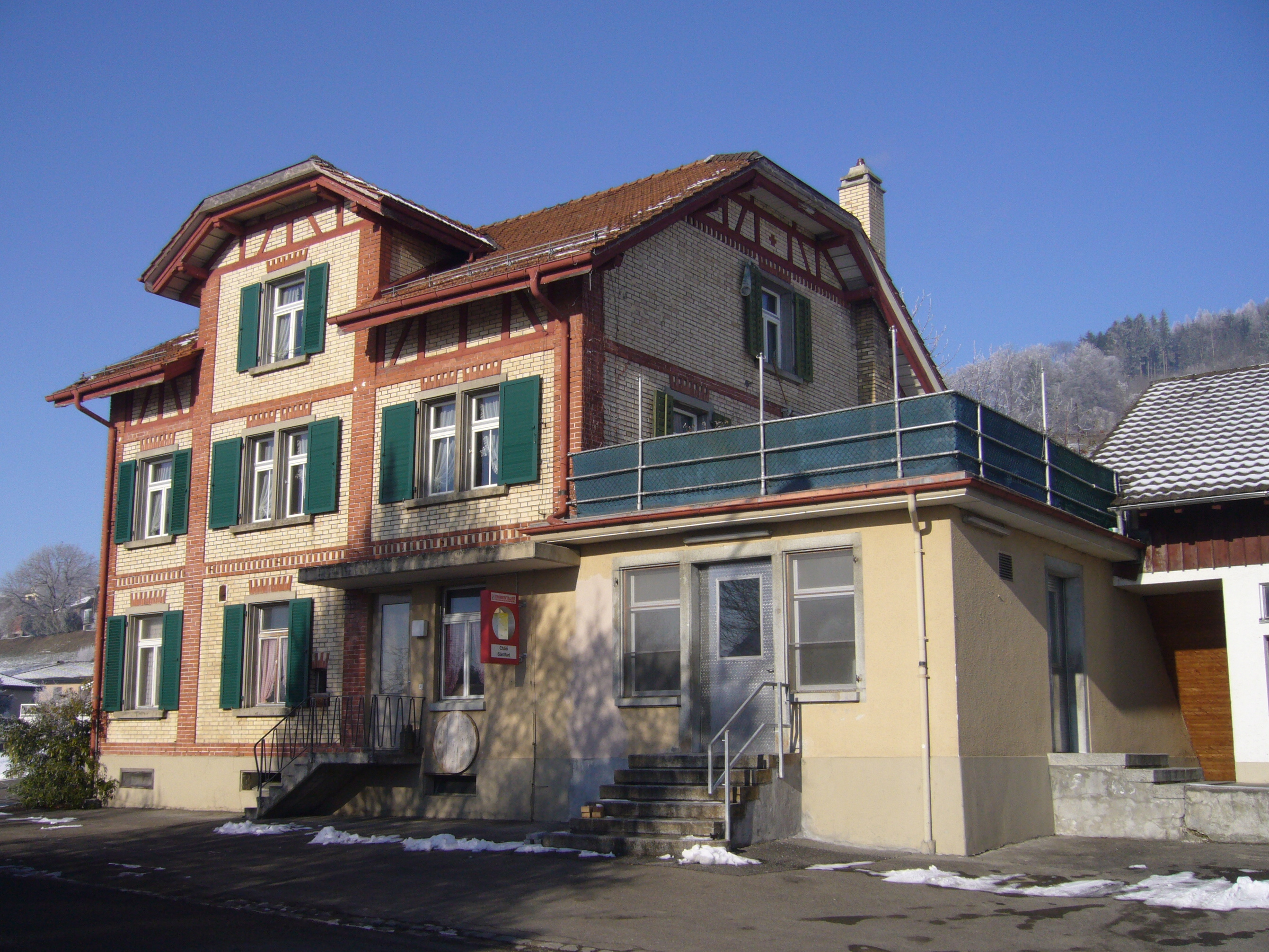 Käserey Stettfurt.